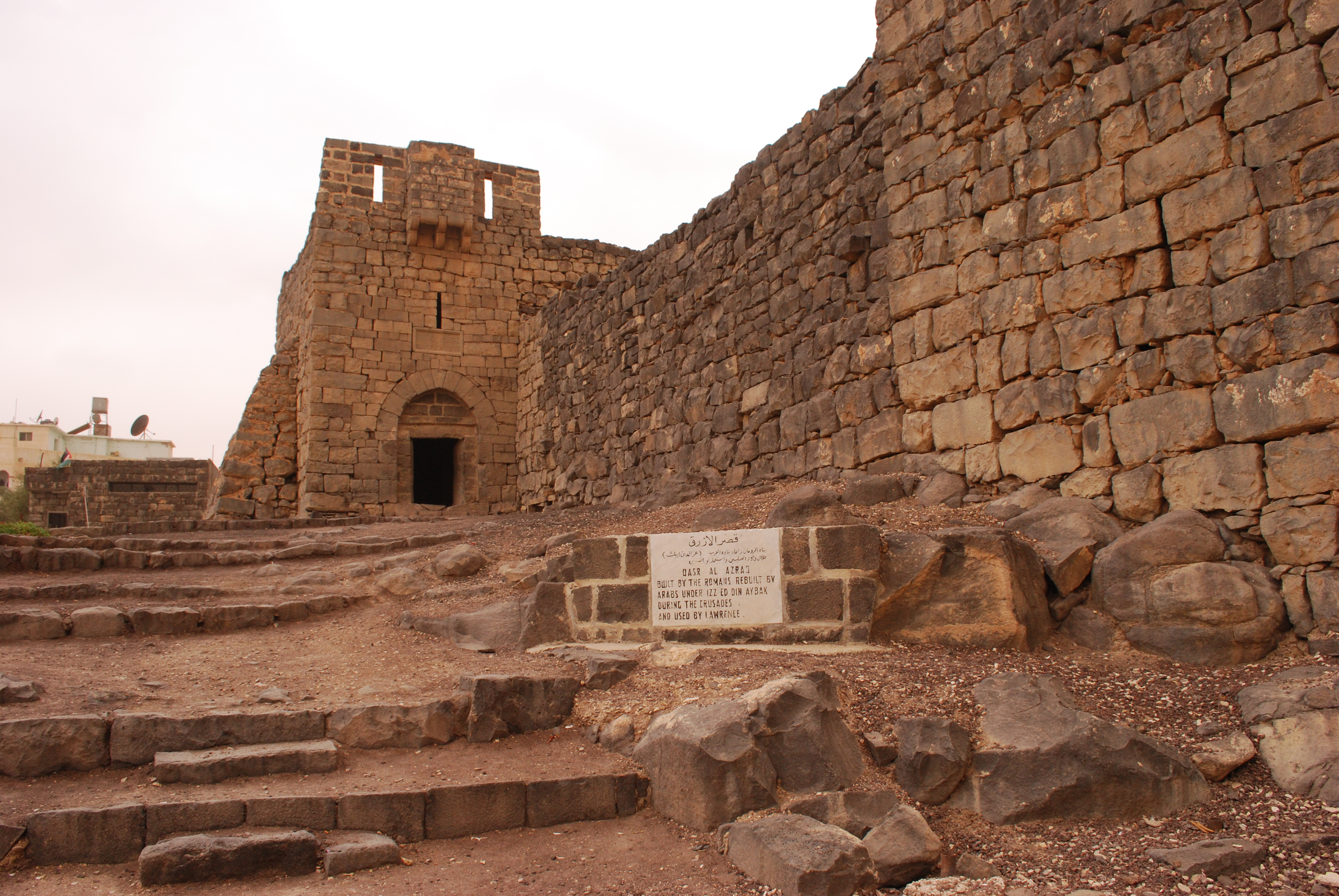 Qasr al-Azrak.